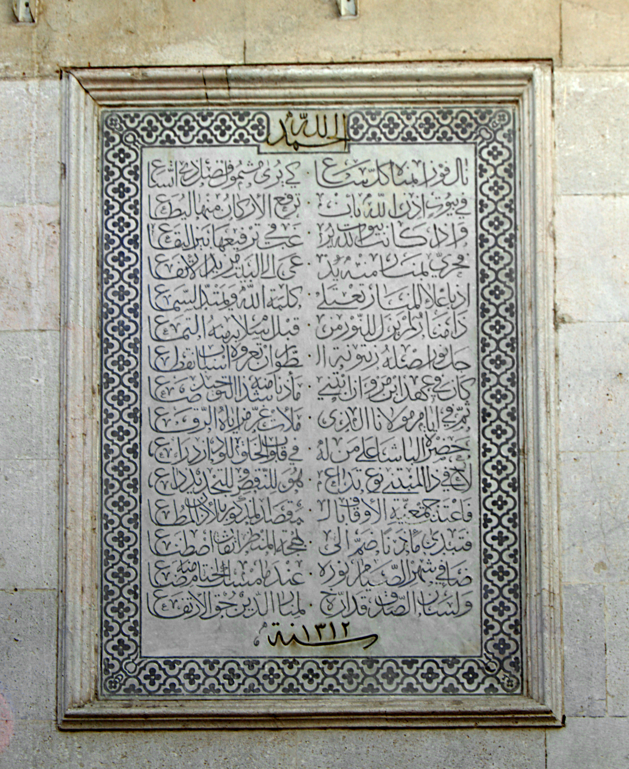 Grande Mosquée (Djamaa Zitouna), Tunis